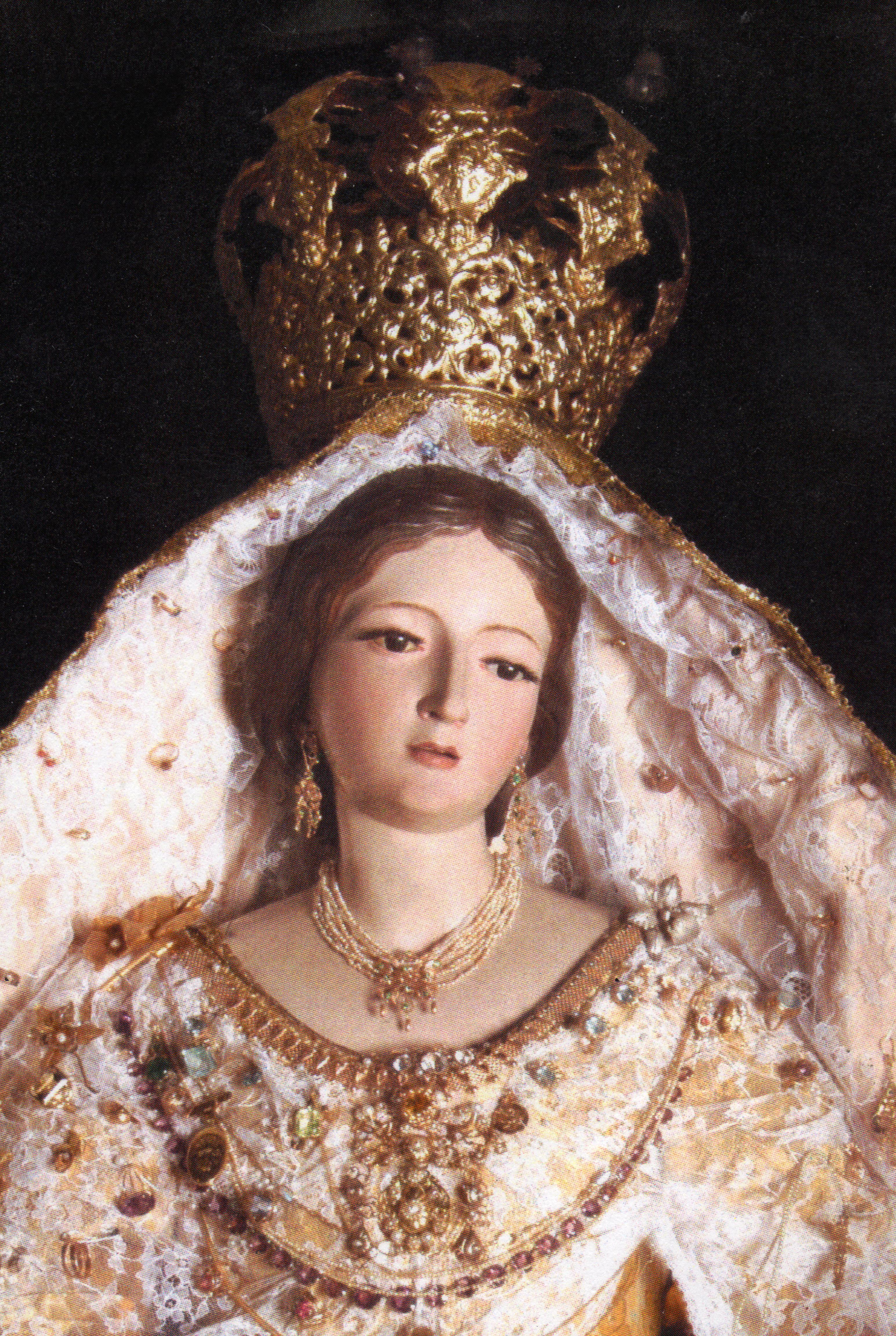 Imagen de Ntra. Sra. de Los Remedios de Los Realejos